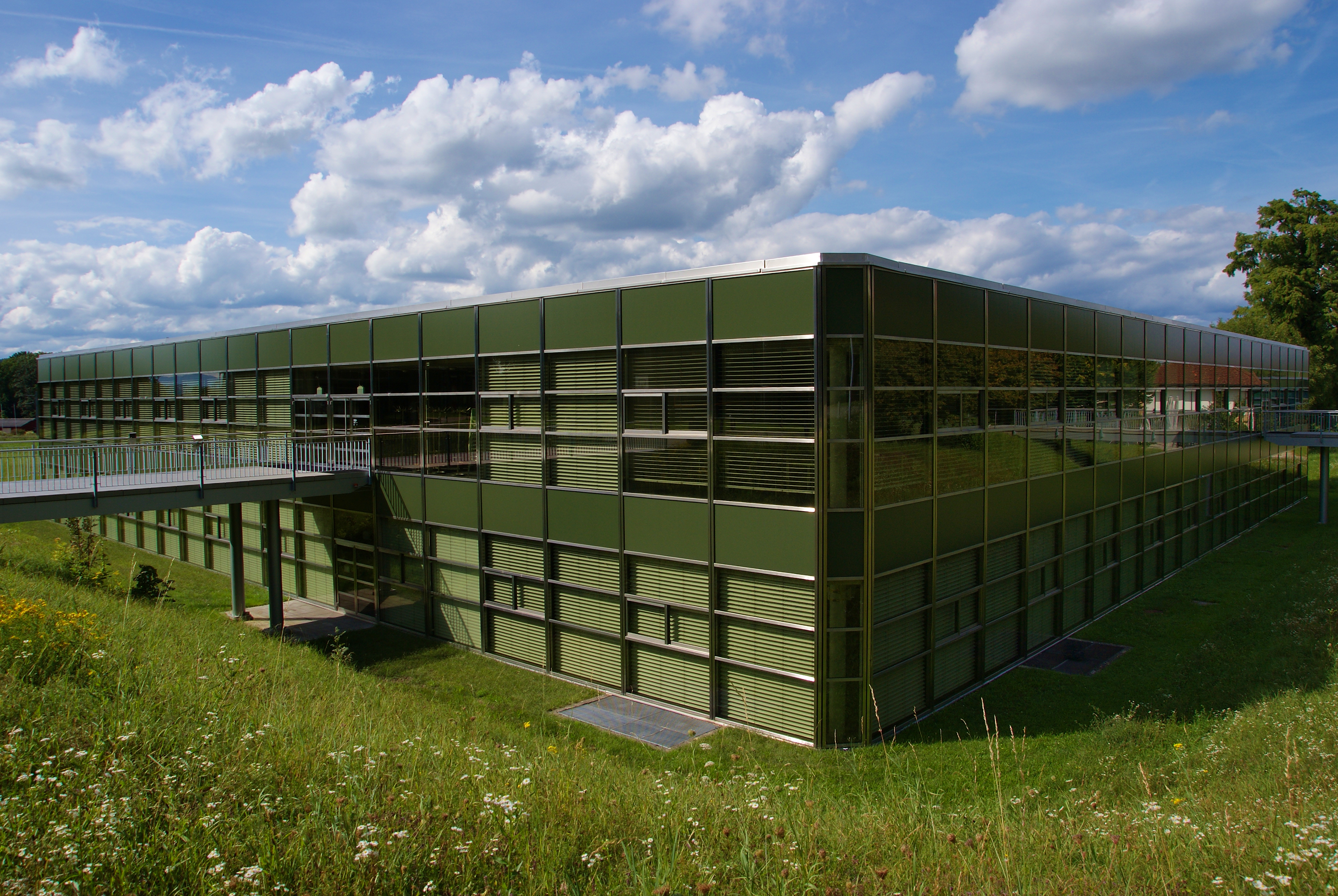 Hauptgebäude des Centre Loewenberg bei Murten von Südosten.